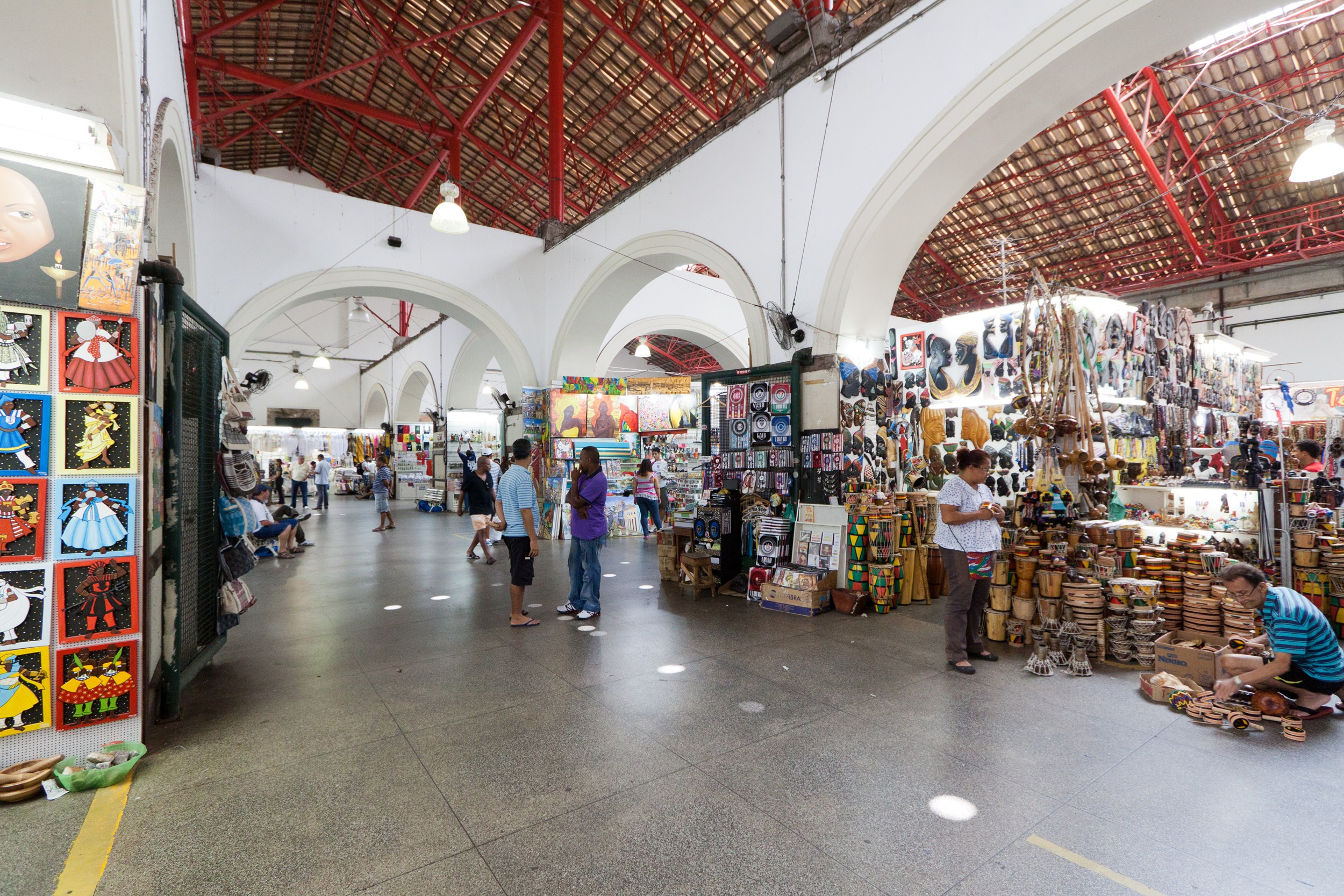 Interior do Mercado Modelo.